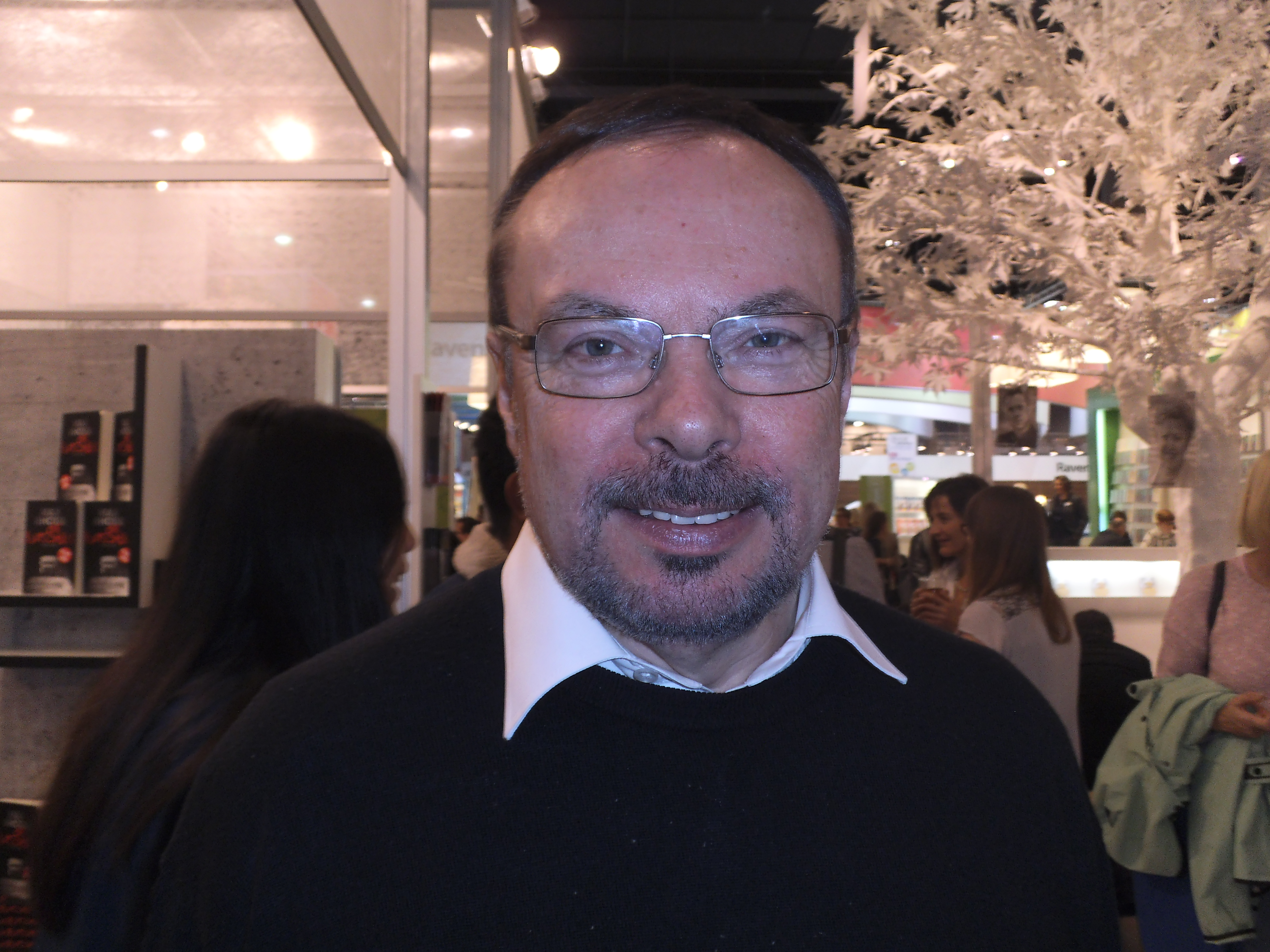 Helmut W. Pesch am 16. Oktober 2015 auf der Frankfurter Buchmesse.